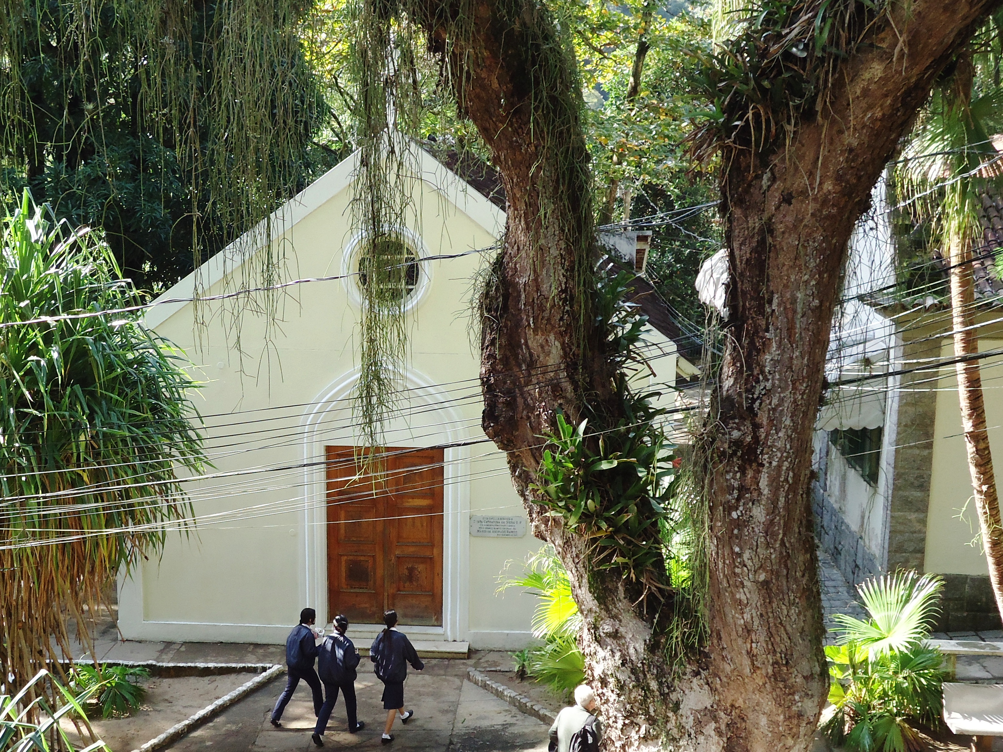 Fundação Osório, Rio Comprido, Rio de Janeiro, RJ, Brasil: fachada da capela.